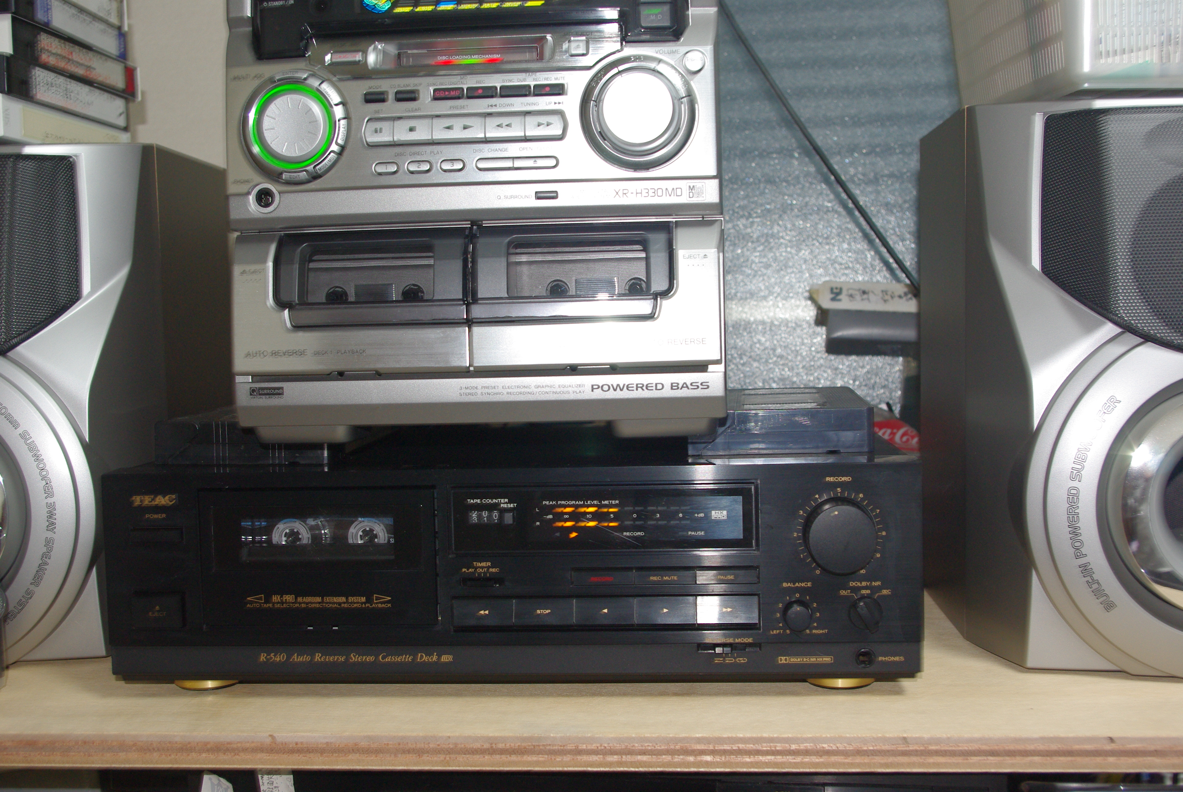 ティアックのオートリバース、ドルビーB/C NR HX PRO ステレオカセットデッキです。撮影者の所有物。